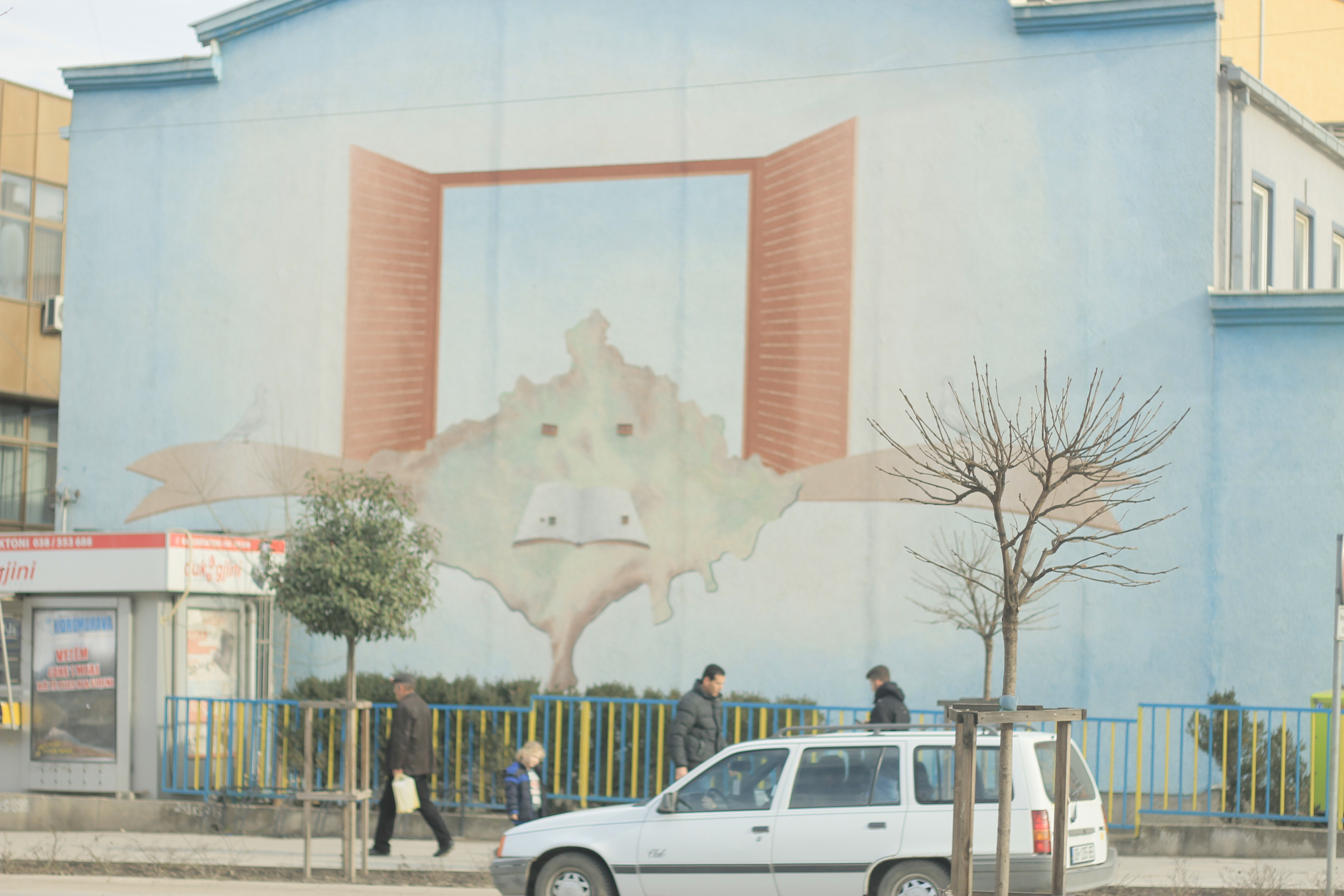 Shkolla Fillore Thimimikto